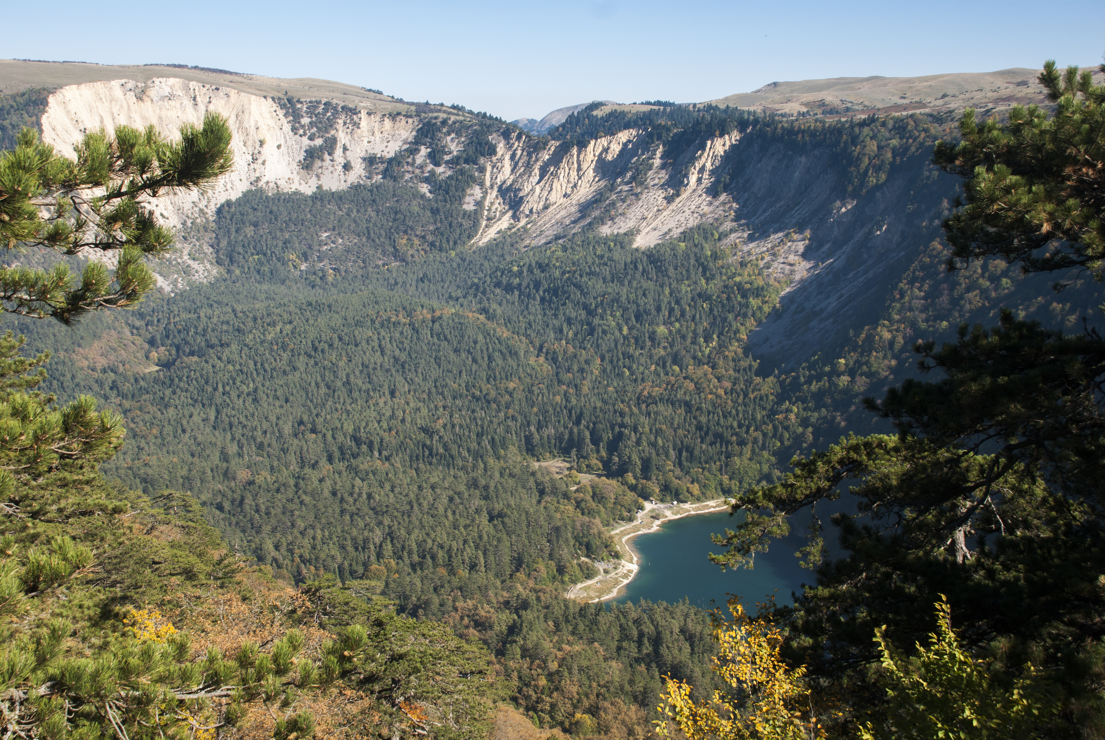 Sakarya, Akyazı Davlumbaz Yaylası'ndan Sülüklü Göl'ün görünümü.